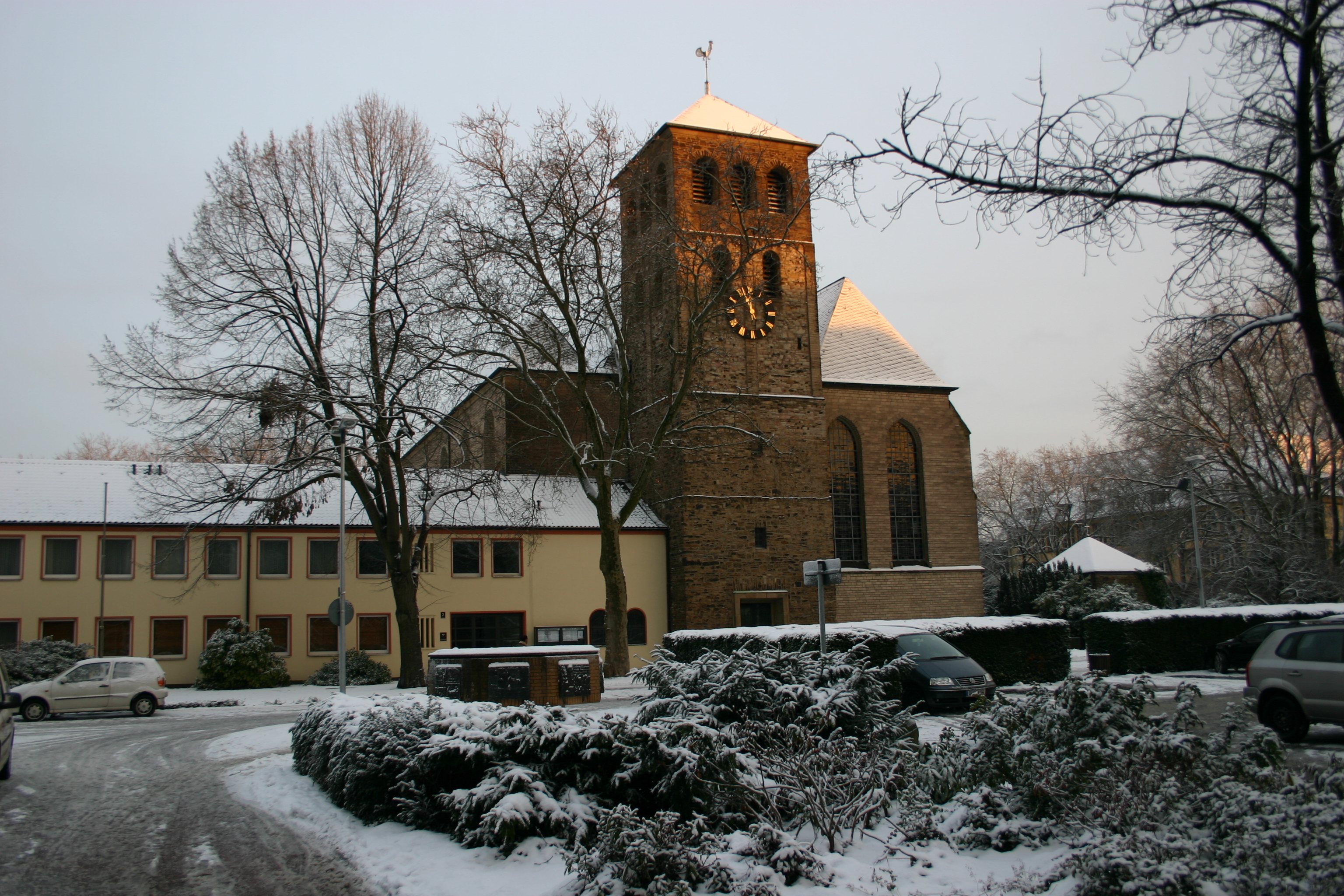 Kirchengebäude der Prämonstratenser-Abtei St. Johann in Duisburg-Alt-Hamborn, 2010. This is a photograph of an architectural monument., no. 0